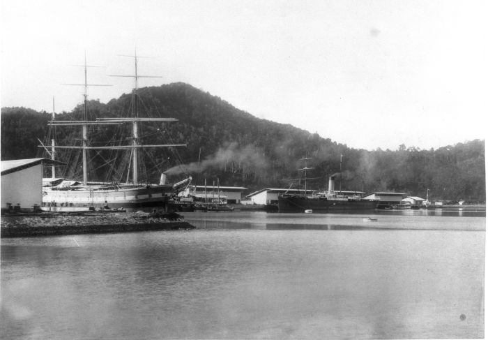 Foto. Padang, Sumatra`s Westkust, schepen in de Emmahaven met op de achtergrond de Apenberg